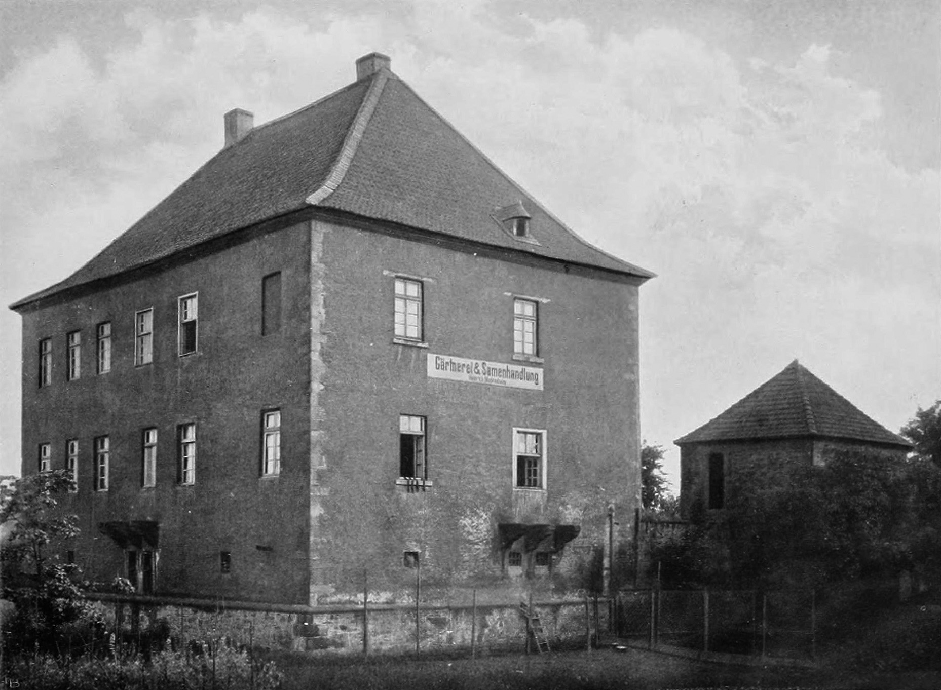 Haus Bönninghausen im heutigen Herne, Ansicht von Nordosten